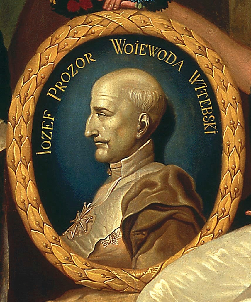 Medalion z wizerunkiem Józefa Prozora (1723-1788) (Fragment obrazu "Portret rodziny Prozorów")